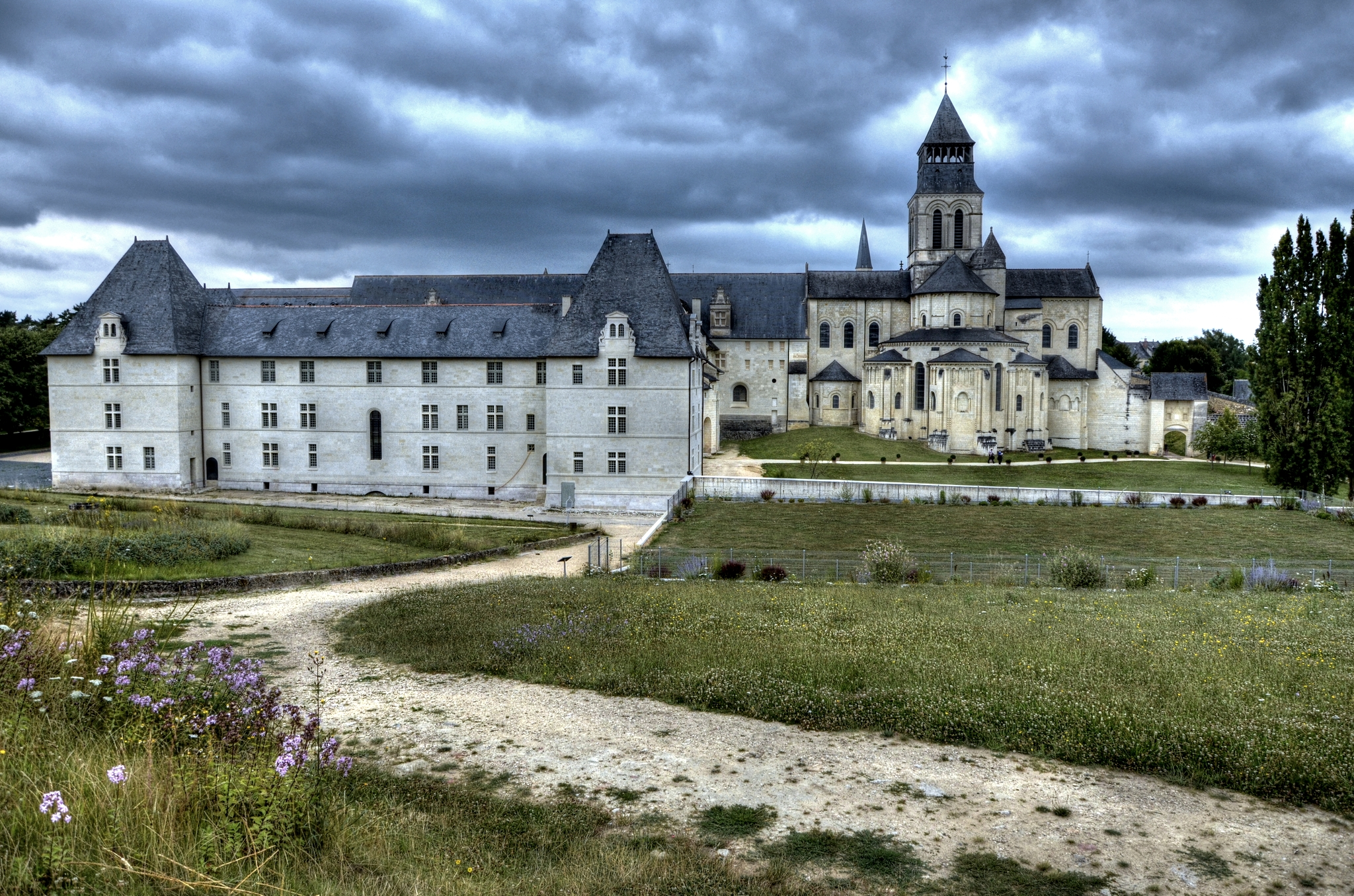 Abbaye de Fontevraud